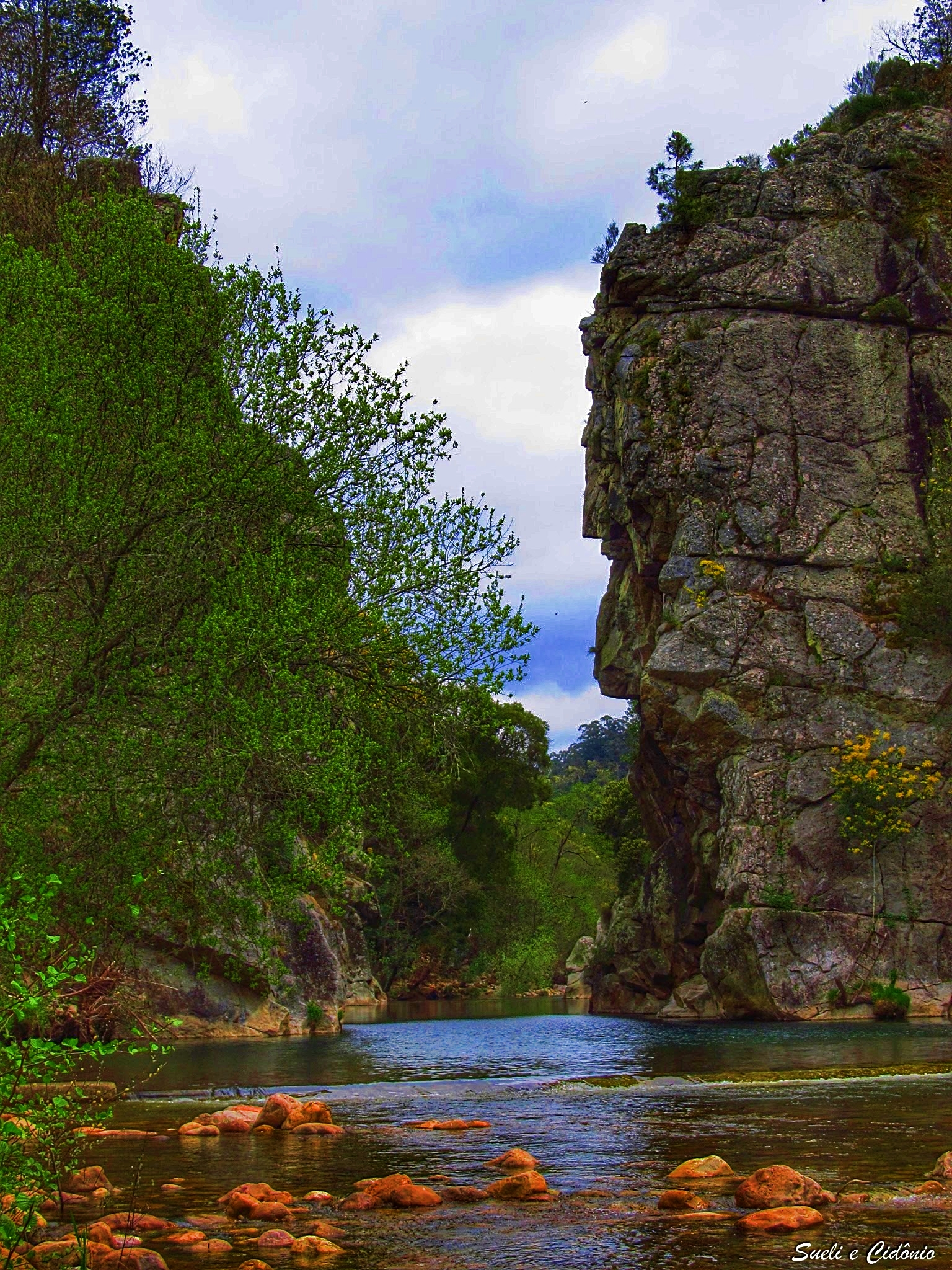 Lousã - Serpins This is a photography of a Site of Community Importance in Portugal with the ID: PTCON0060. Natura2000 entry, EEA entry